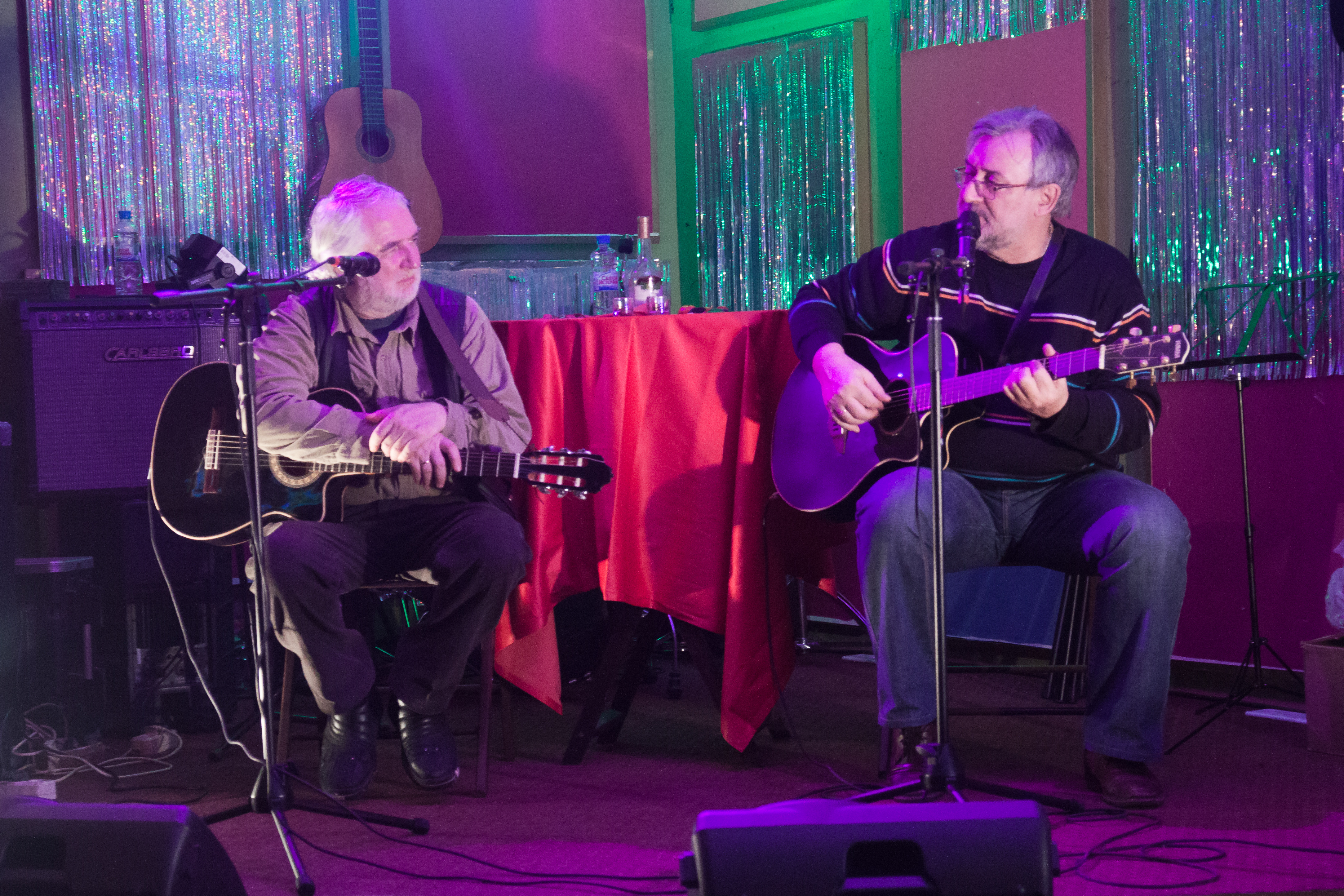 Концерт Юрия Лореса и Сергея Матвеенко